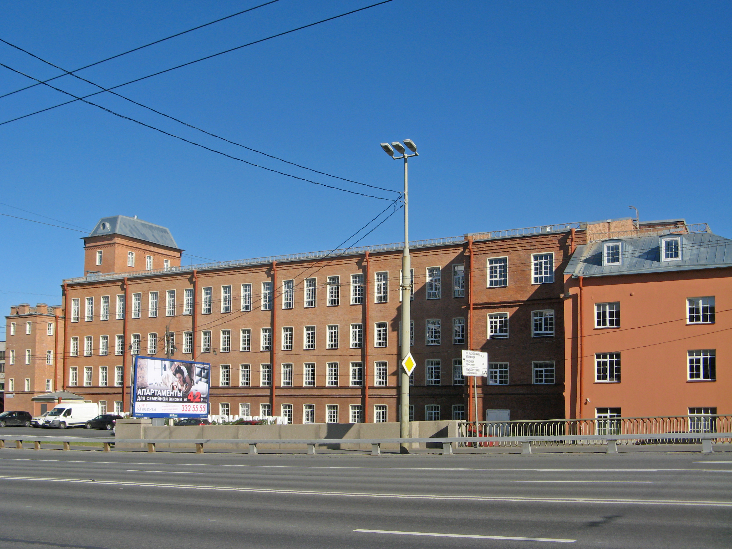 Ткацкий корпус: Кантемировская улица, 3 корпус 1 литеры А, Б, Выборгский район, Санкт-Петербург